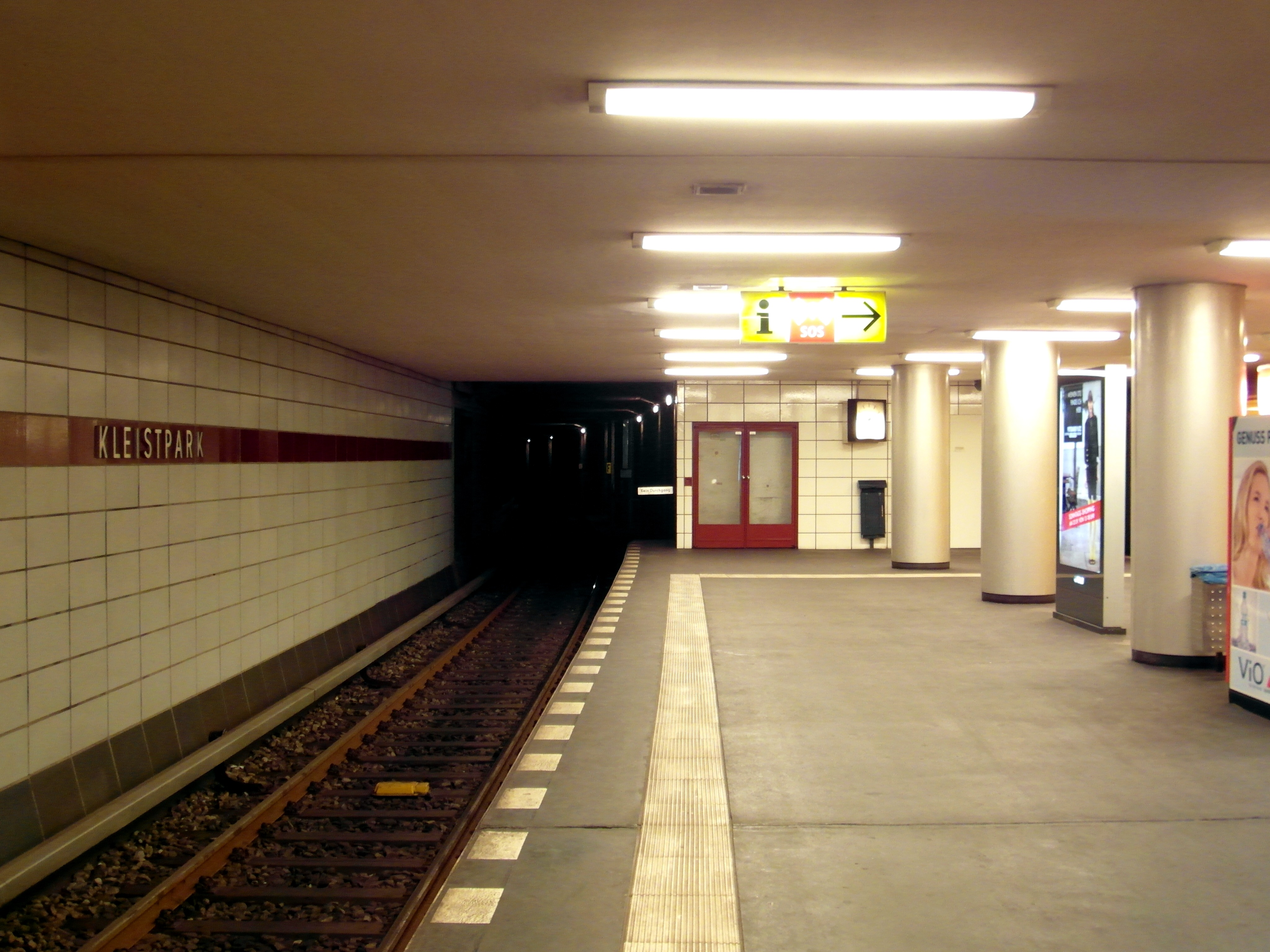 Linie U7